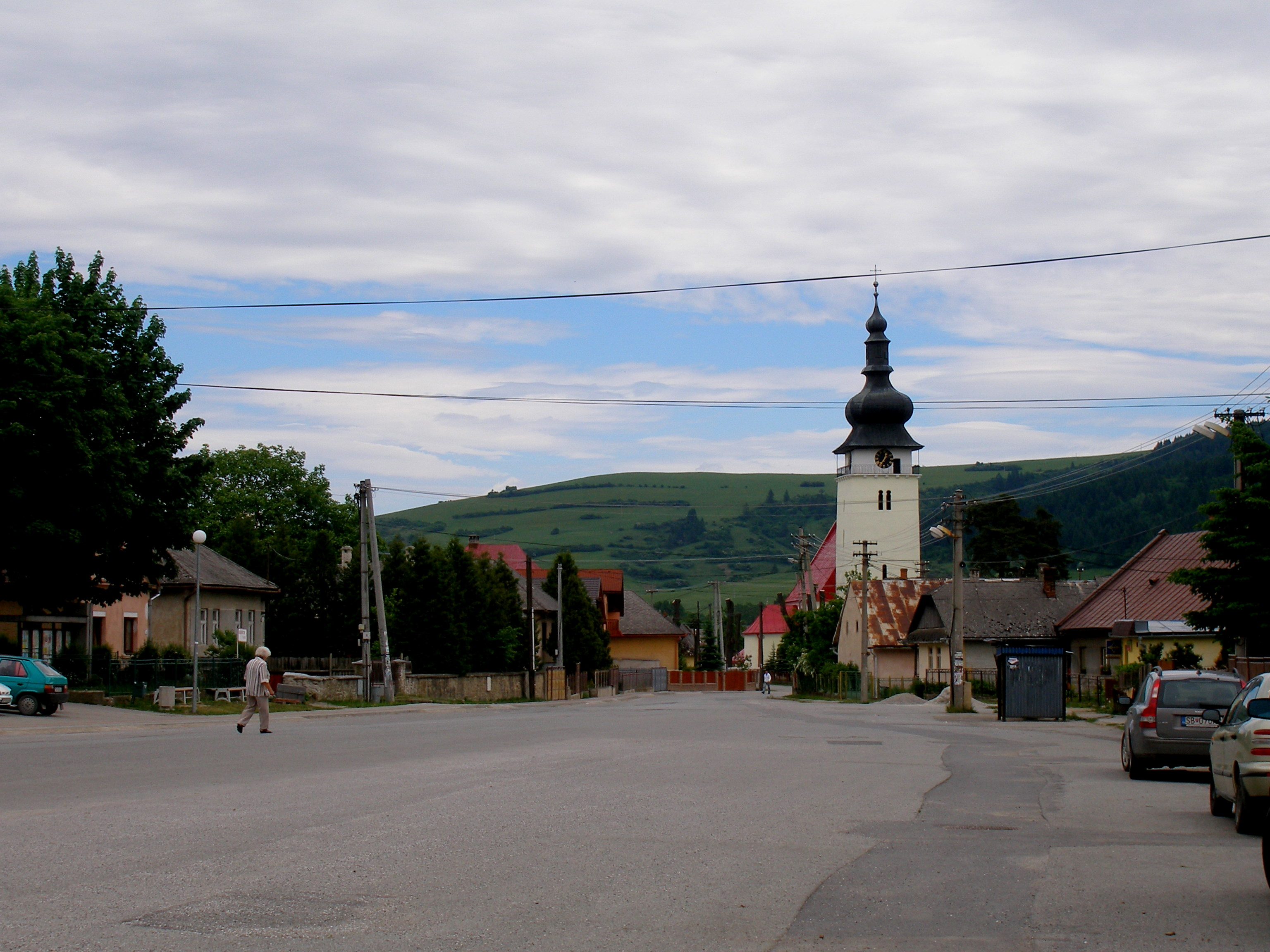 Obec Brezovica okres Sabinov. This medium shows the protected monument with the number 708-270/0 (other) in the Slovak Republic.